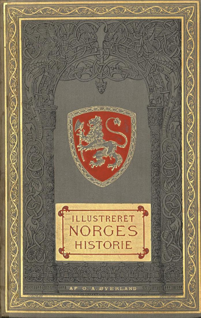 Omslaget til O.A. Øverlands Illustreret Norges historie fra 1893